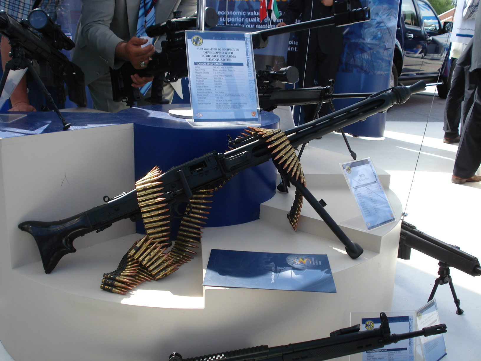 IDEF '07 Savunma Fuarı'nda çekildi.Mg3. 23 Mayıs 2007